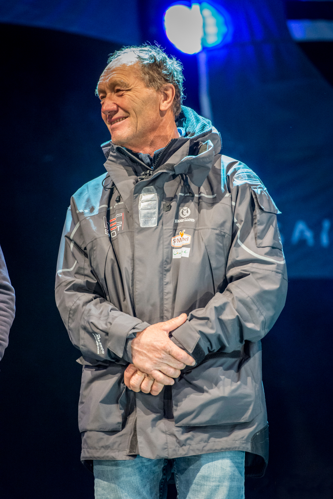 route_du_rhum_2014-228